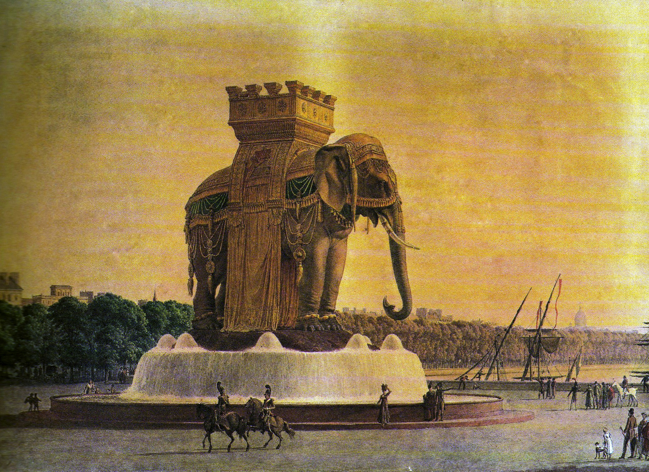 Der "Elefant der Bastille" in Paris/Projekt